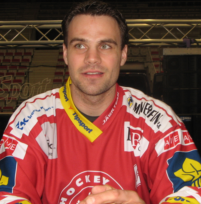 Po zakončení sezóny 2014/15 ve Werk Areně